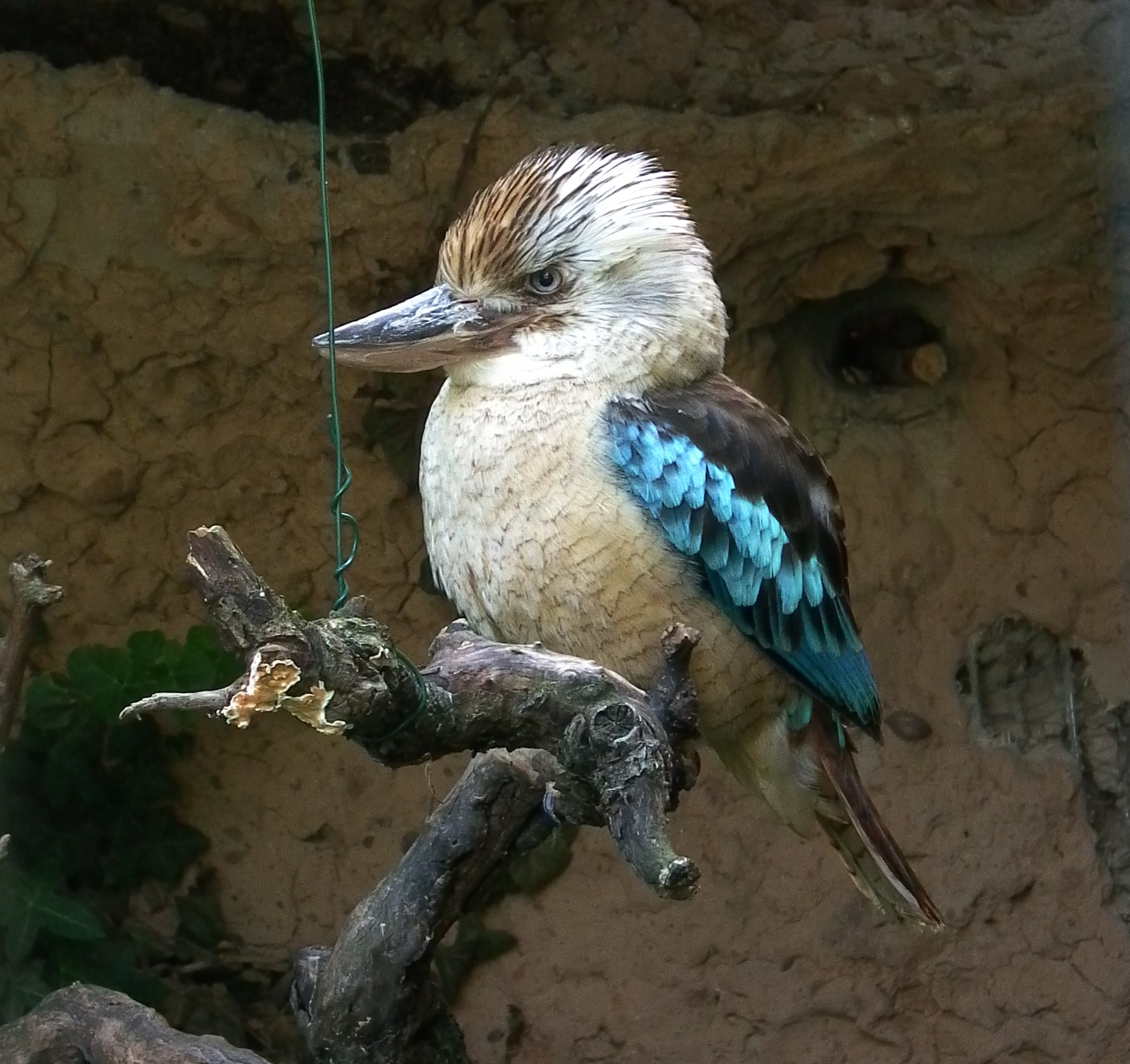 Blauflügelkookaburra (Dacelo leachii), fotografiert im Zoo Landau (Rheinland-Pfalz, Deutschland)